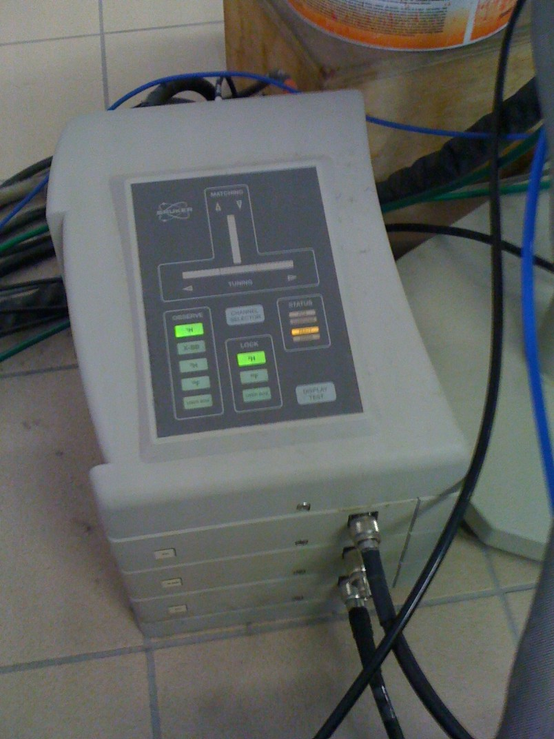 Préamplificateur Bruker 3 canaux